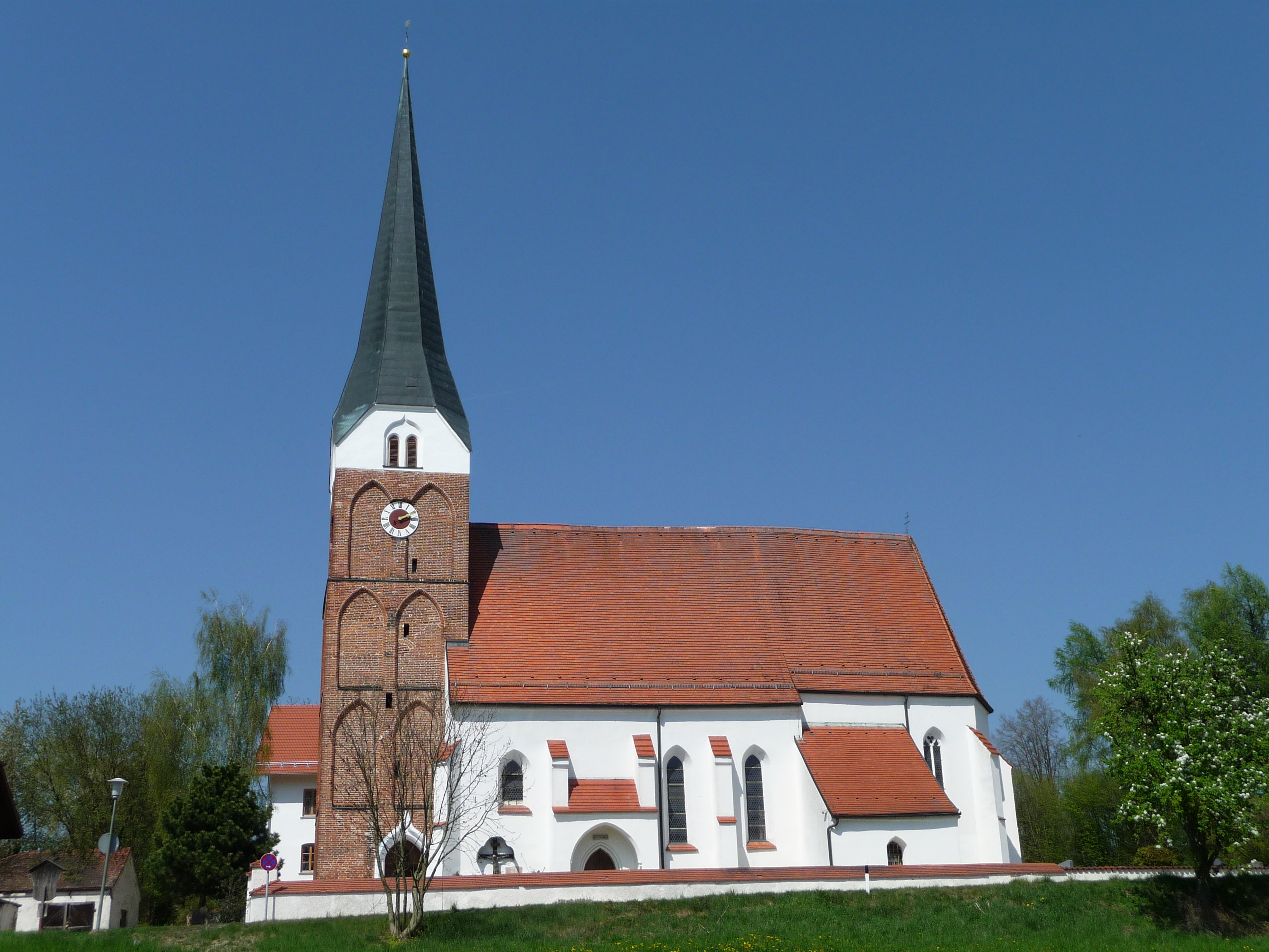 Die Pfarrkirche Maria Himmelfahrt in Wolfakirchen